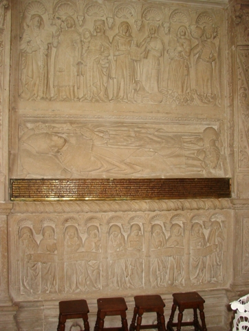 Tombeau de Hugues des Hazards situé dans le mur gauche de l'église Saint-Médard de Blénod-les-Toul. Licensing (© Francis MONTIGNON) GFDL